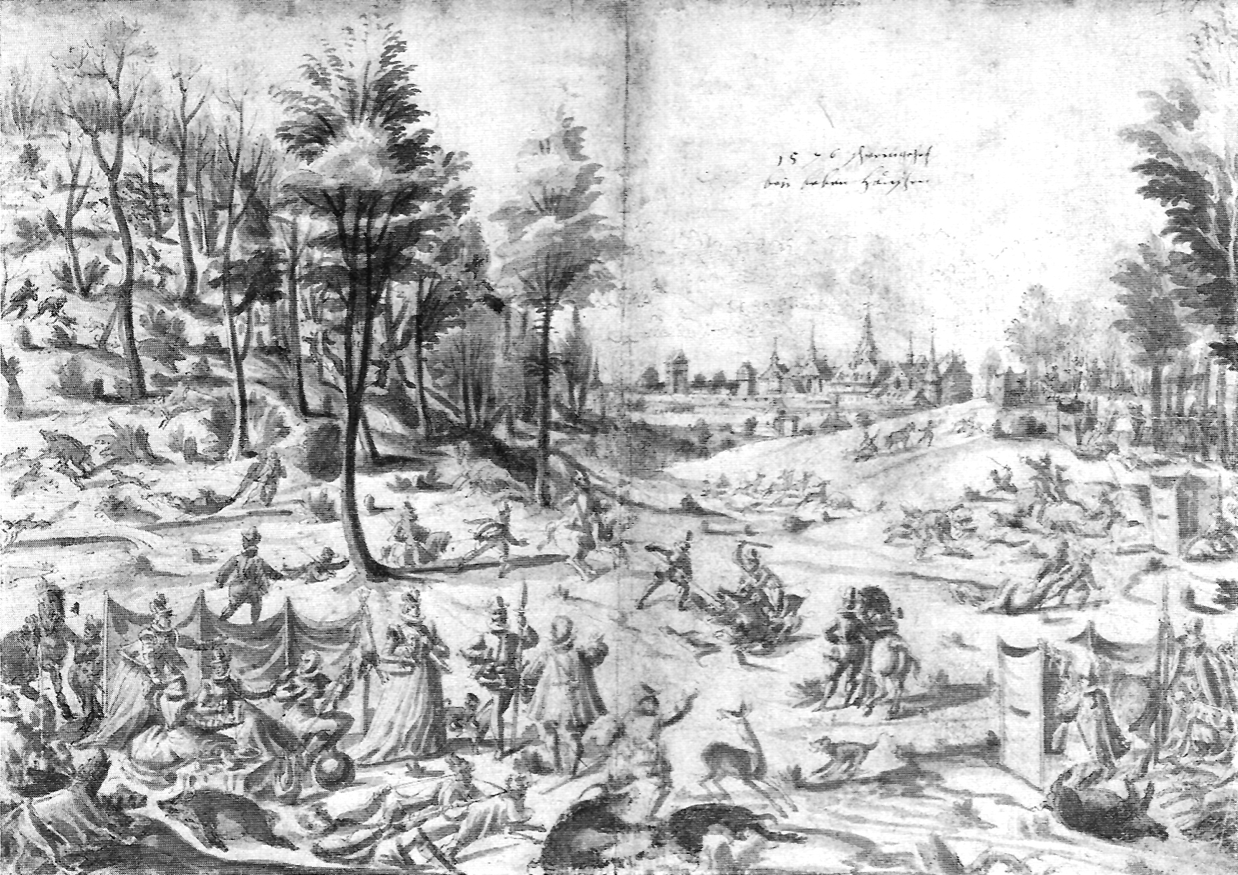 Wildschweinjagd bei Bebenhausen (Federzeichnung laviert)